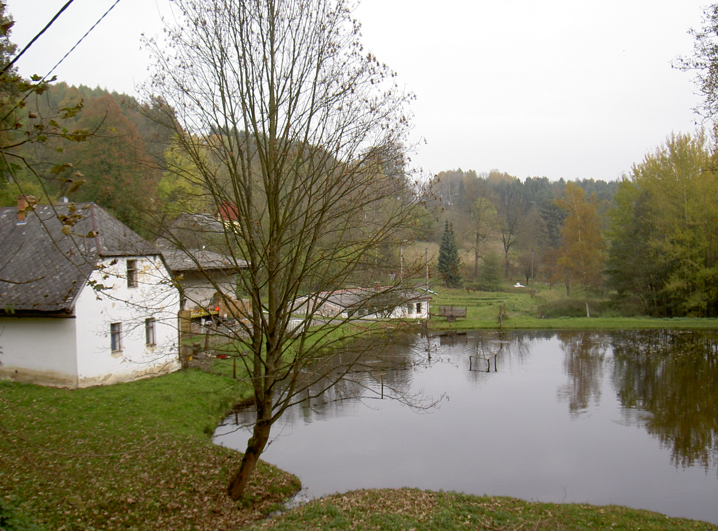 Pivoň